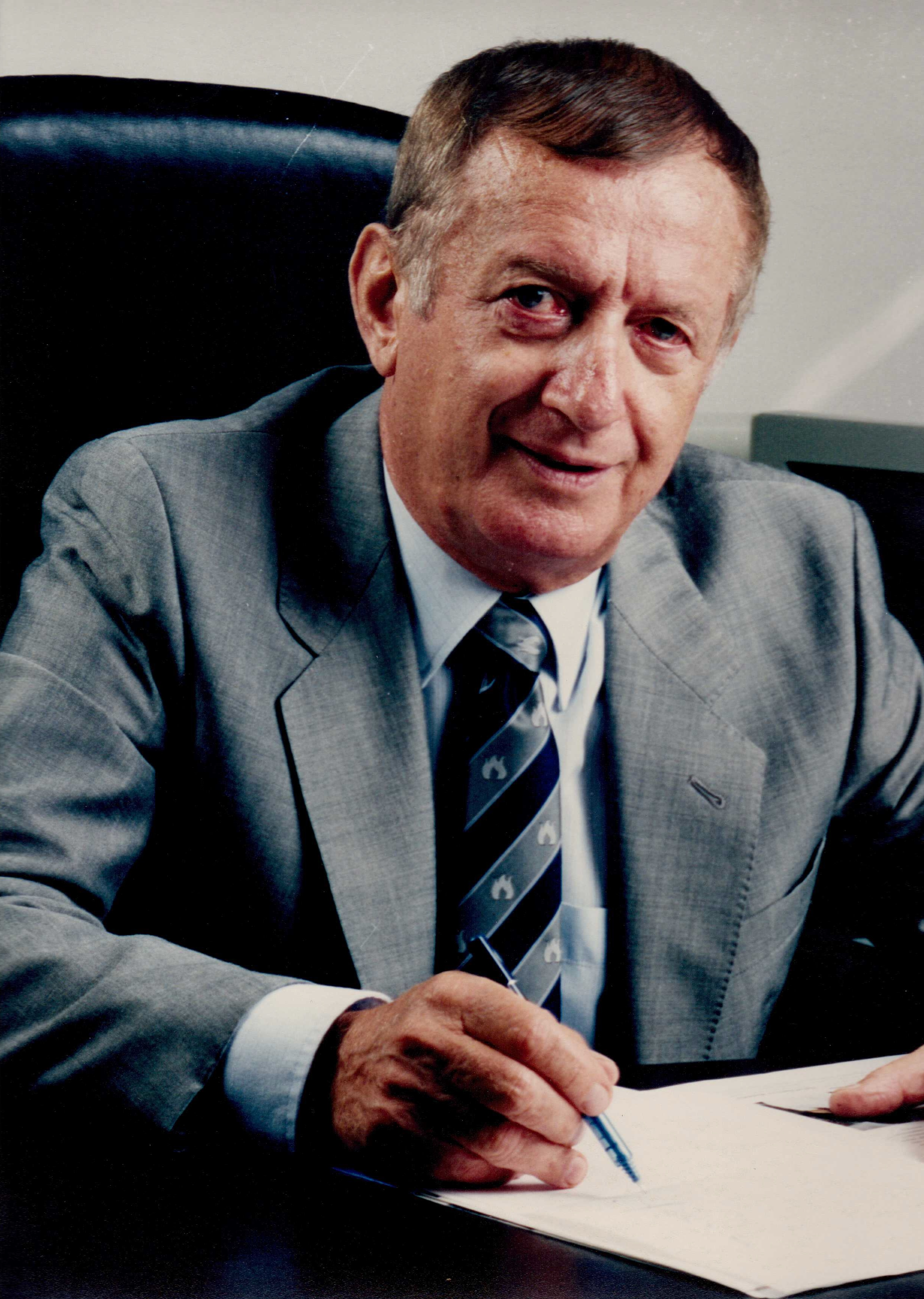 יושב במשרדי